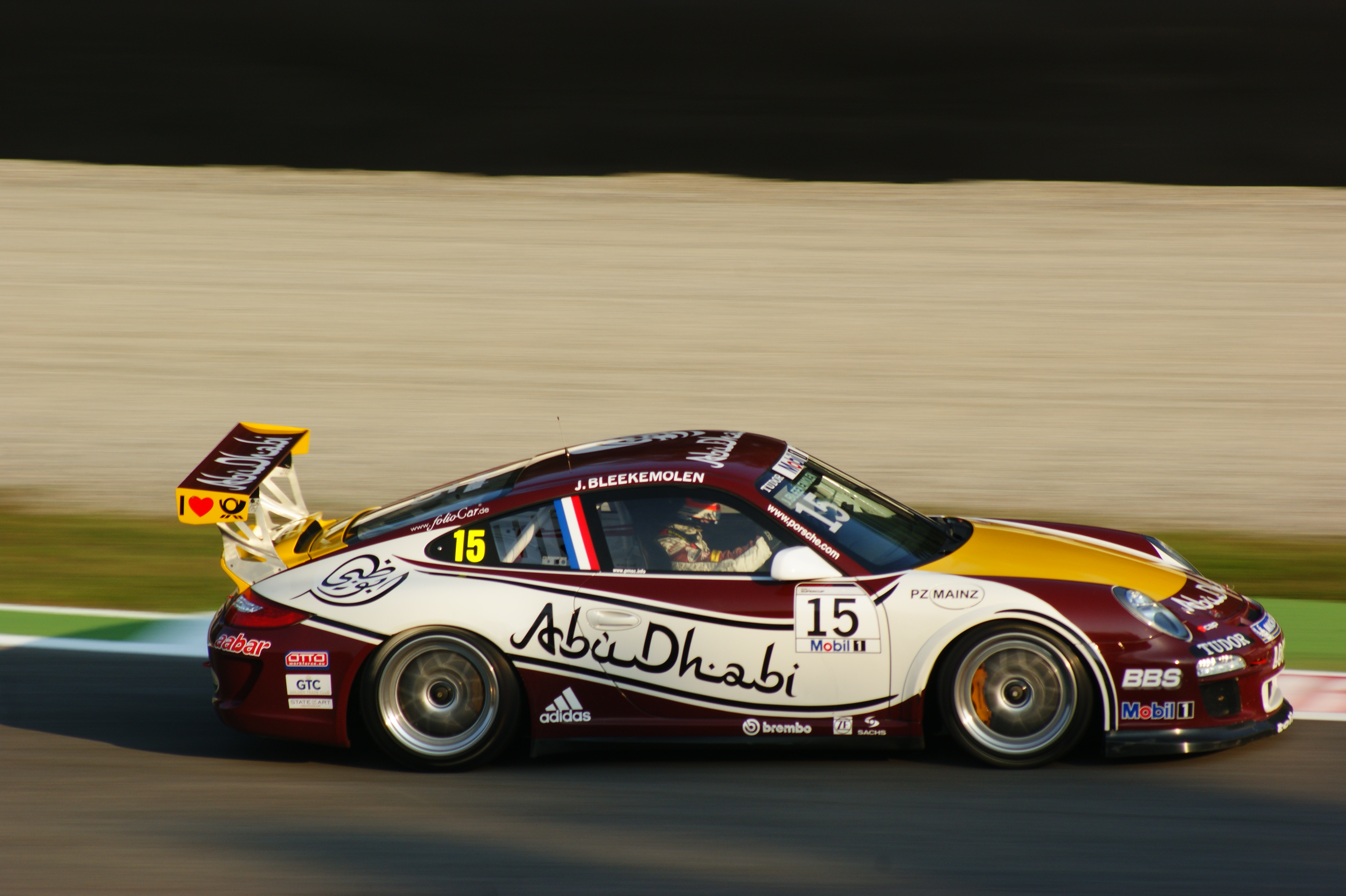 Jeroen Bleekemolen alla variante Ascari Monza 2011